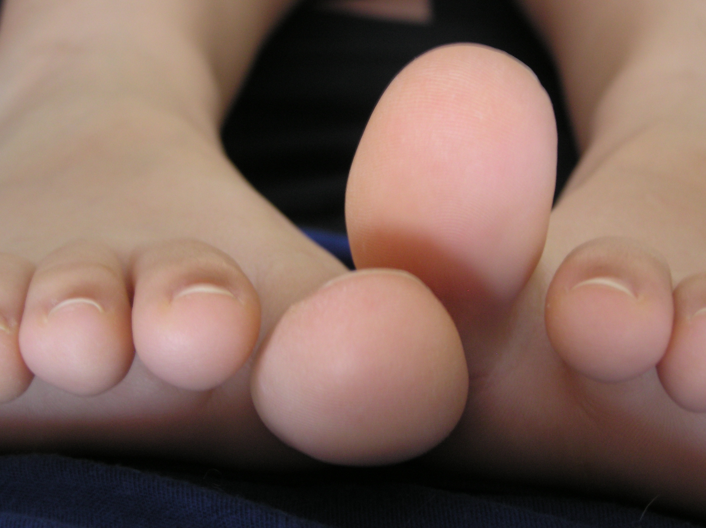 weibliche Füße mit Detailaufnahme große Zehe.